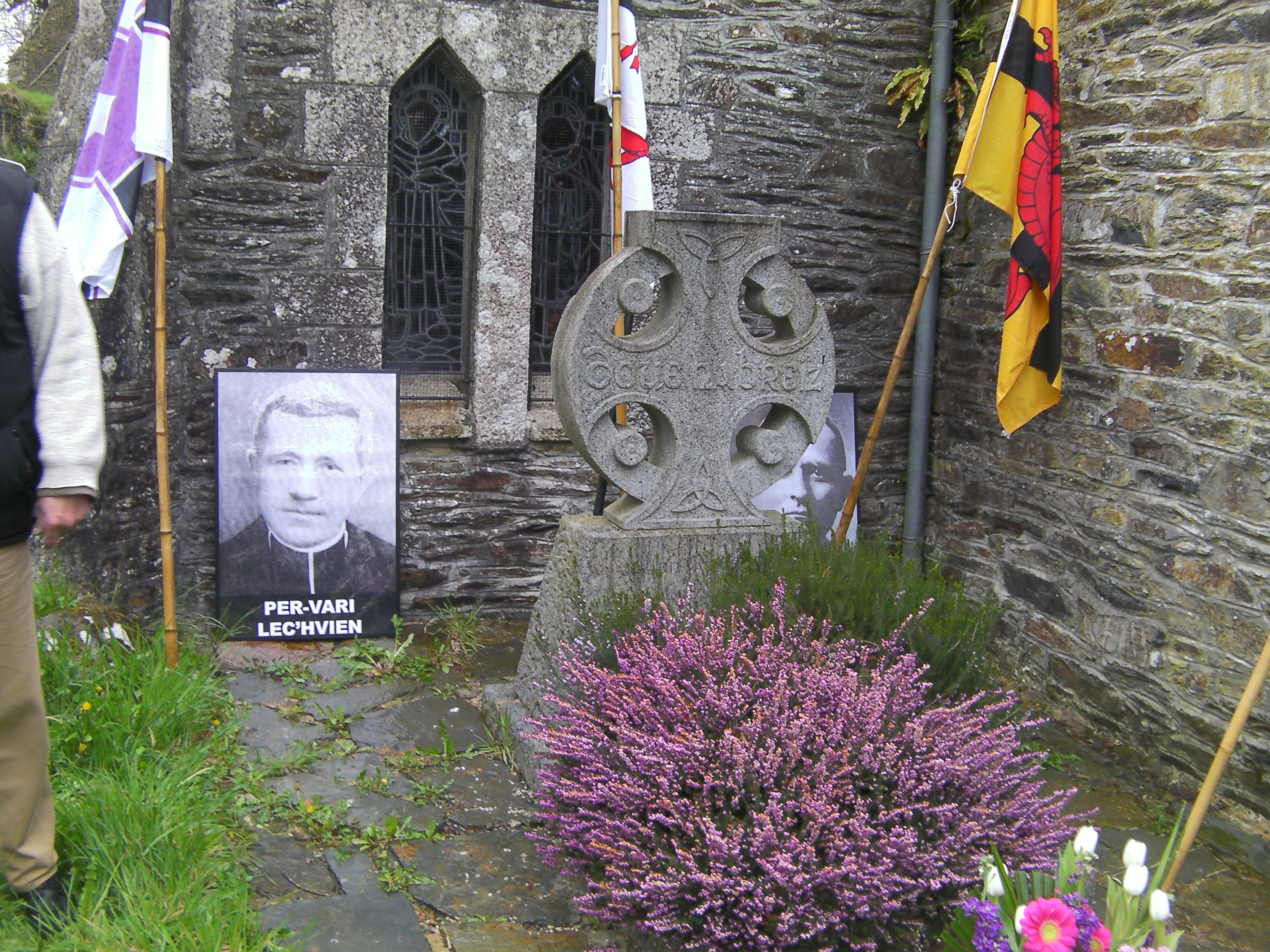 Koun al lun Fask e Koad kev, en enor d'ar vroadelourien breton.